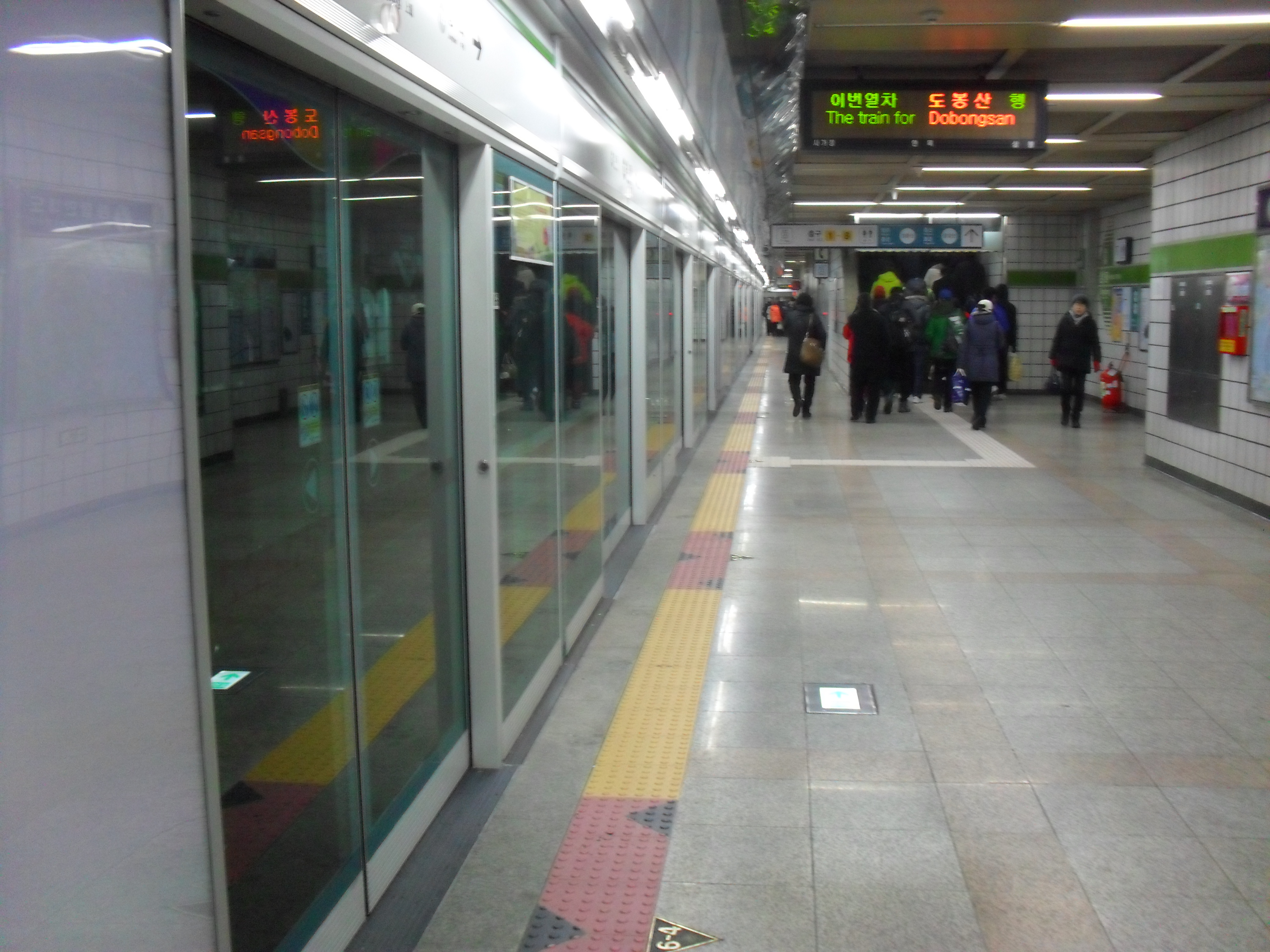 7号線上鳳駅 ホーム